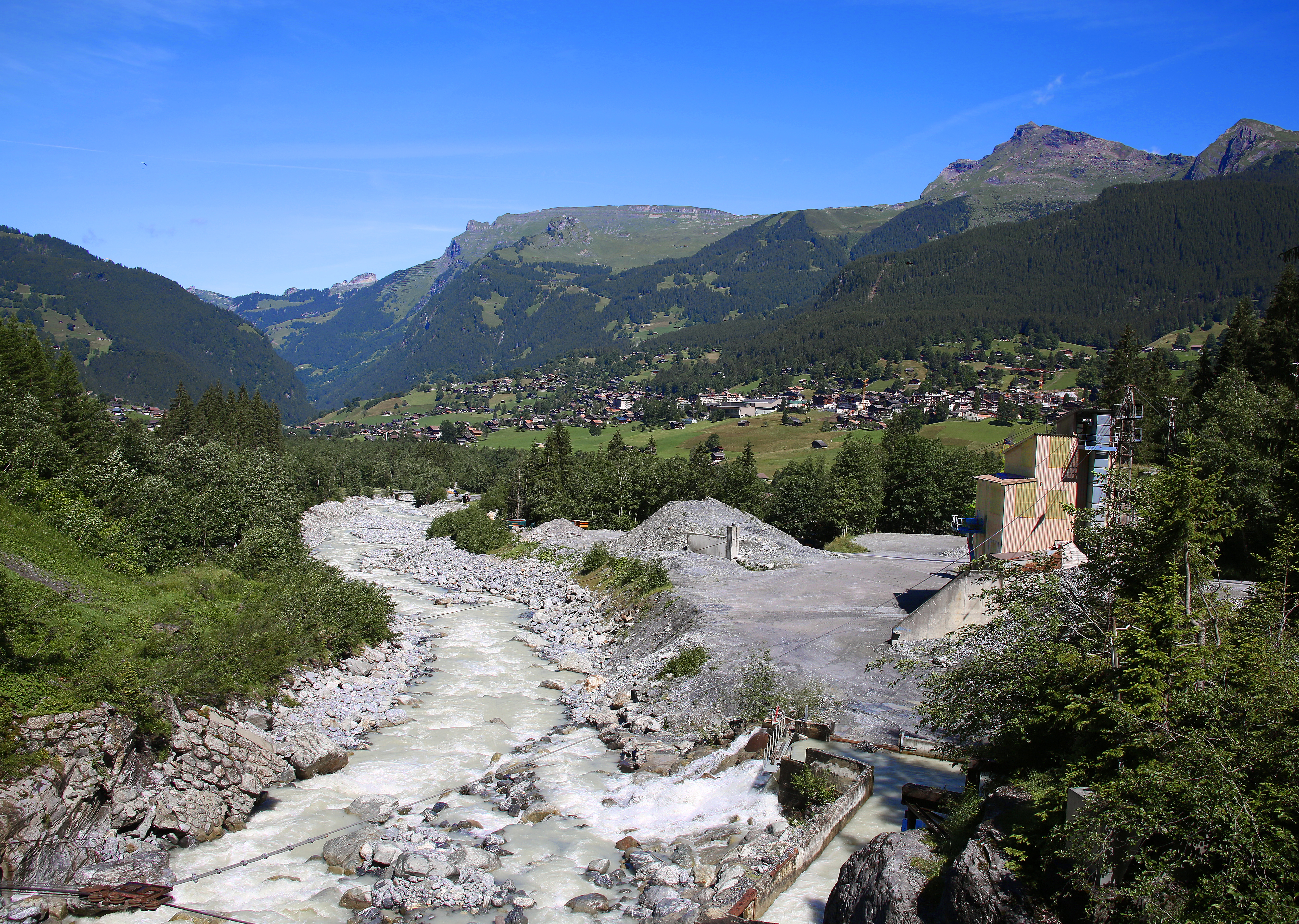 Weisse Lütschine, tributary of the Schwarze Lütschine, at Gletscherschlucht with Mine near Grindelwald, Switzerland.